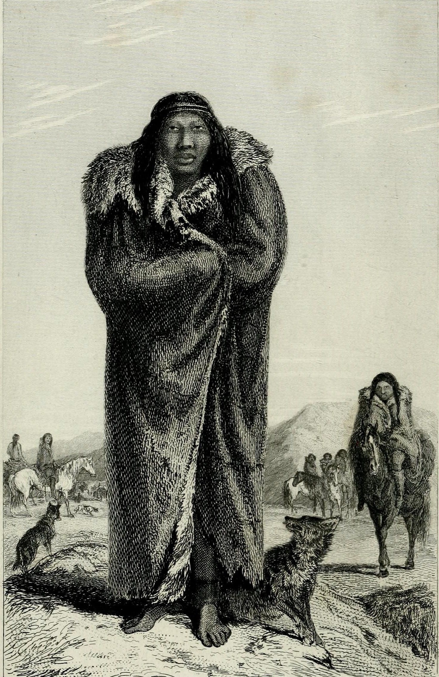 Imagen de María, una patagona que habitaba en Bahía Gregorio en el Estrecho de Magallanes. Tomada de "Narrative of the surveying voyages of His Majesty's Ships Adventure and Beagle between the years 1826 and 1836, describing their examination of the southern shores of South America, and the Beagle's circumnavigation of the globe. Proceedings of the first expedition, 1826-30, under the command of Captain P. Parker King, R.N., F.R.S. London: Henry Colburn."